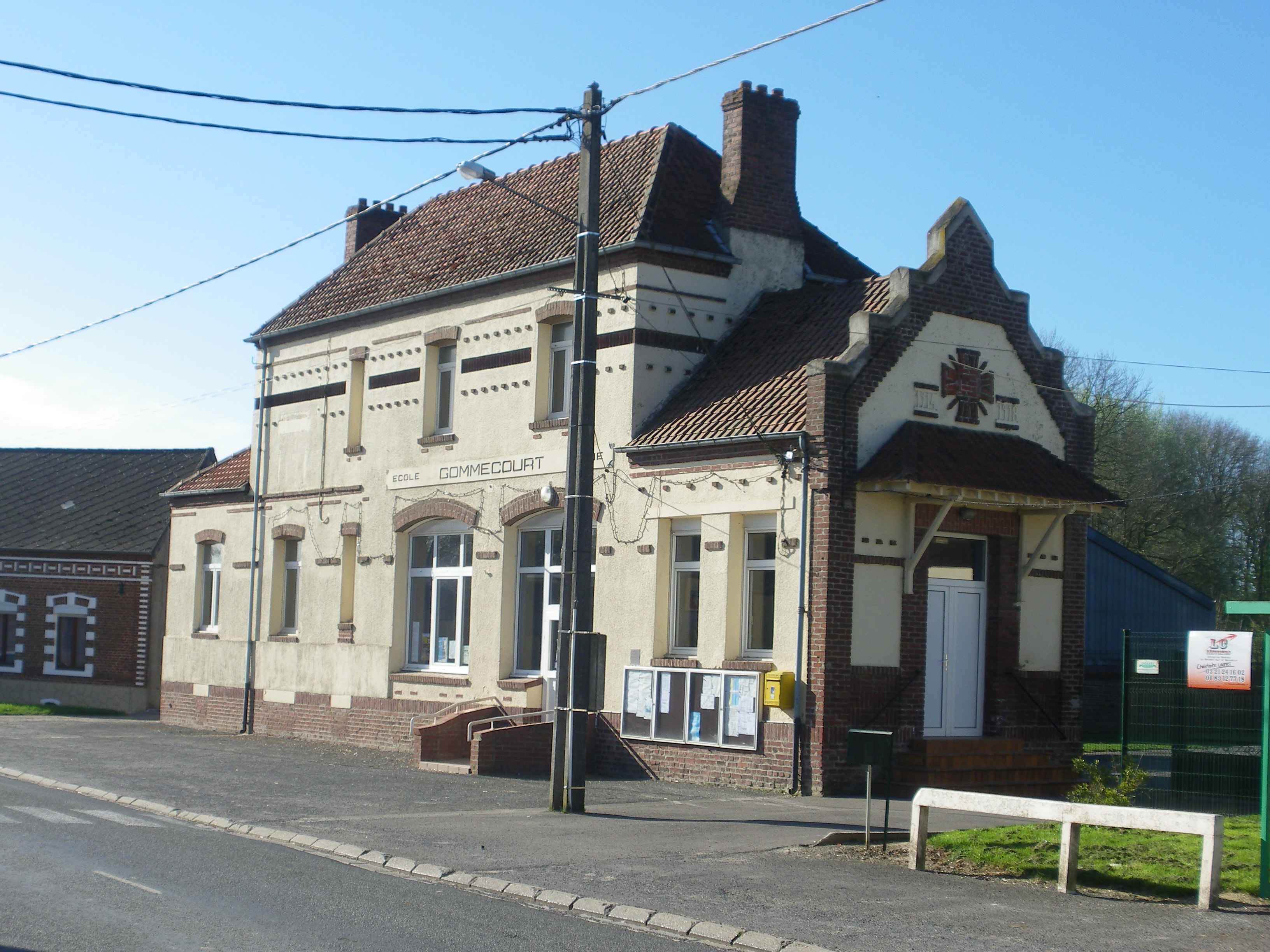 Vue de la mairie-école de Gommecourt (62).